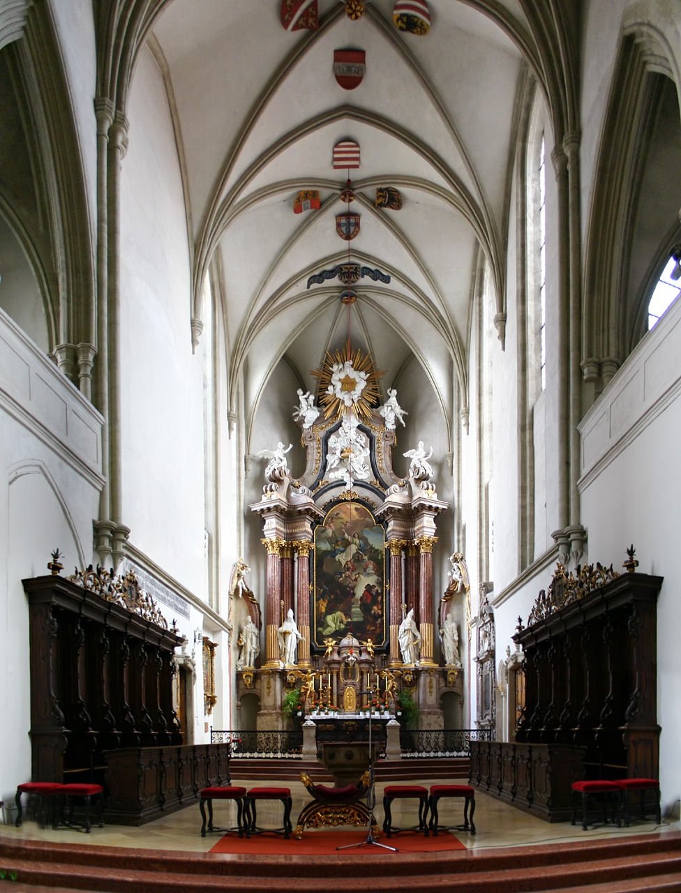 Chorbereich und Altar Wiener Neustädter Dom